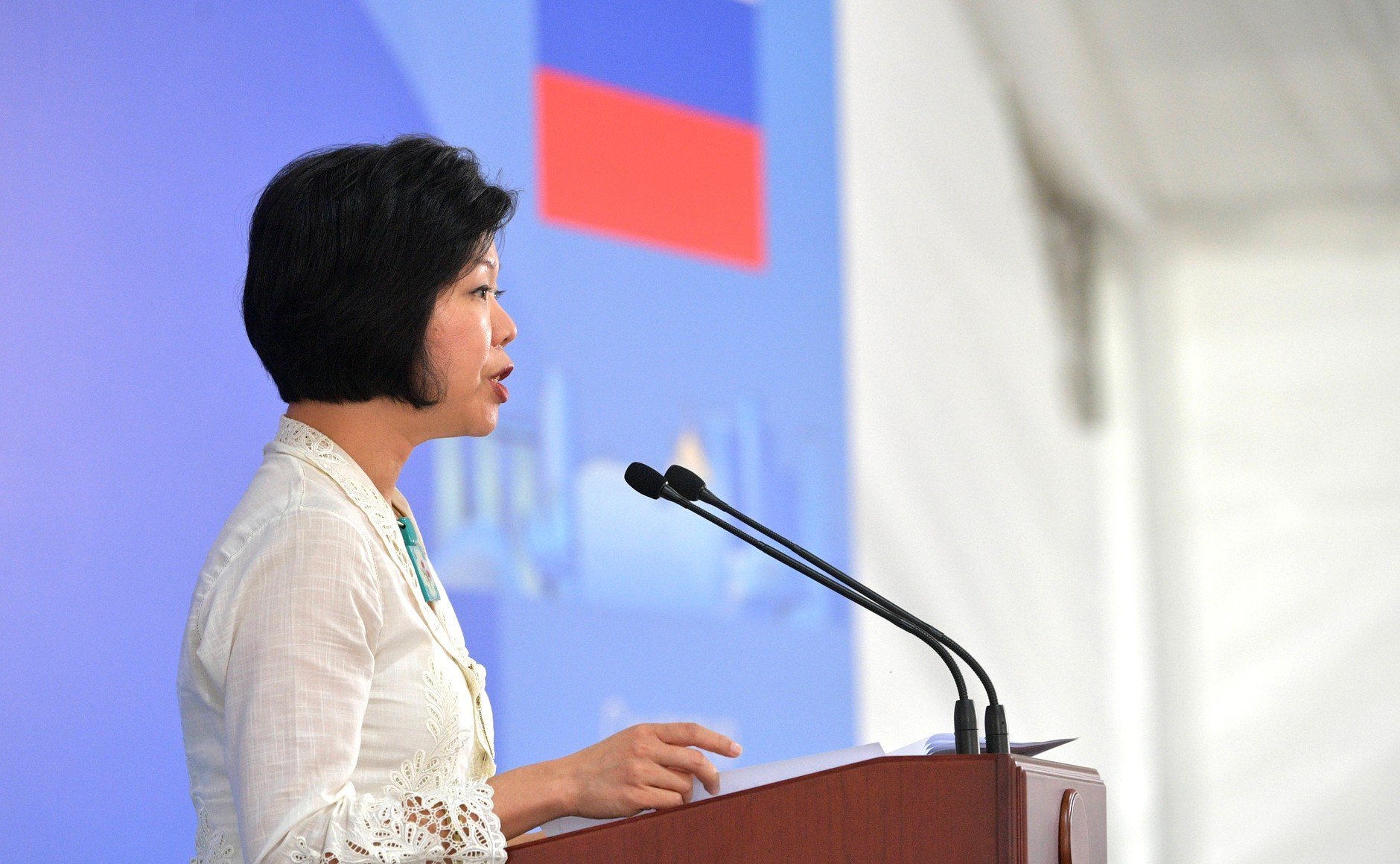 Vladimir Putin and President of Singapore Halimah Yacob attended the groundbreaking ceremony for a Russian Cultural Centre.